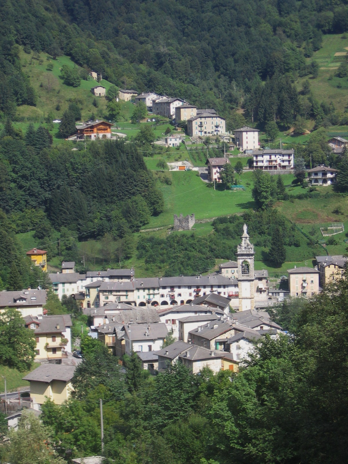 Averara, Bergamo, Italy